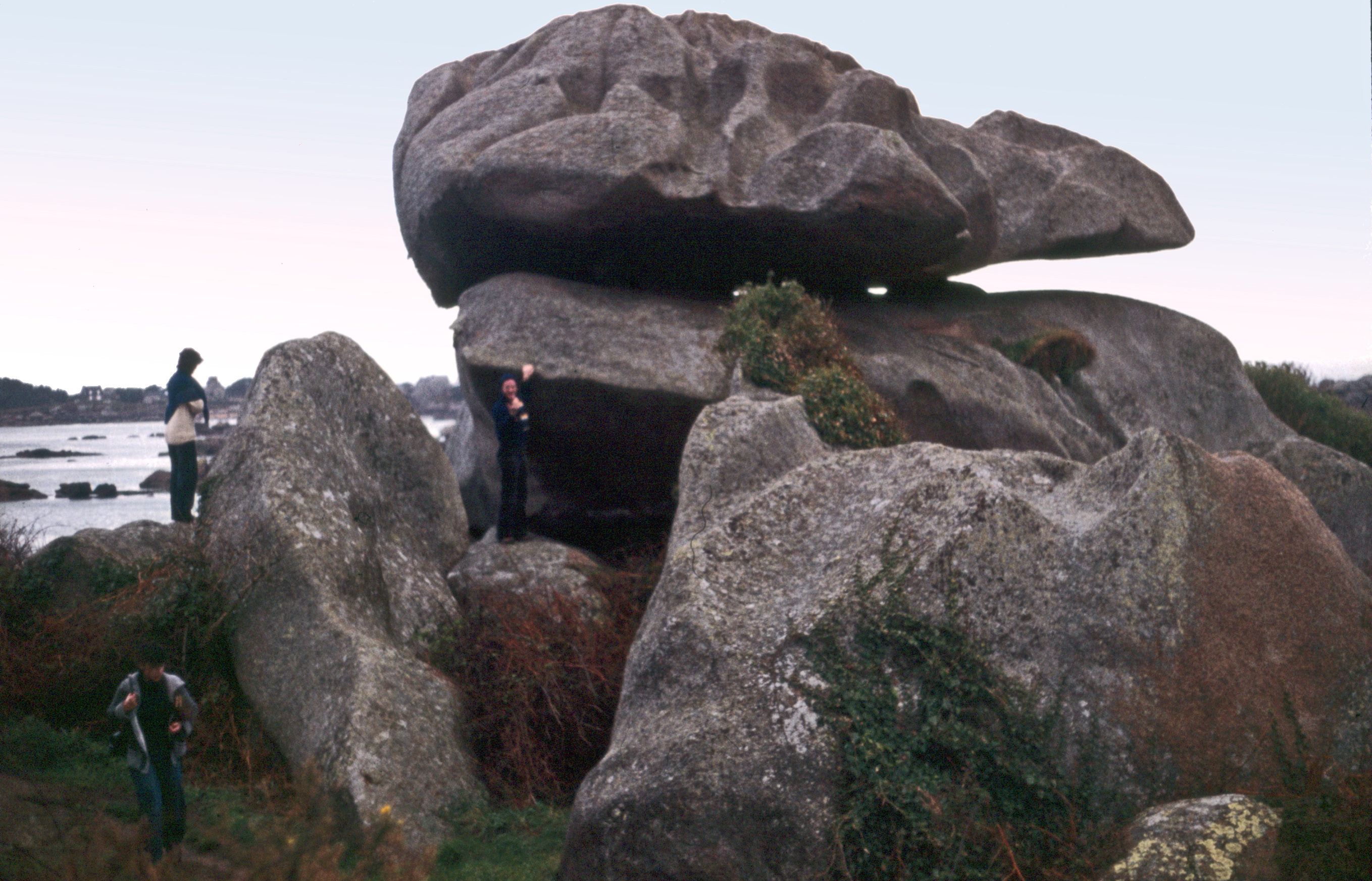 Trégastel, 1978